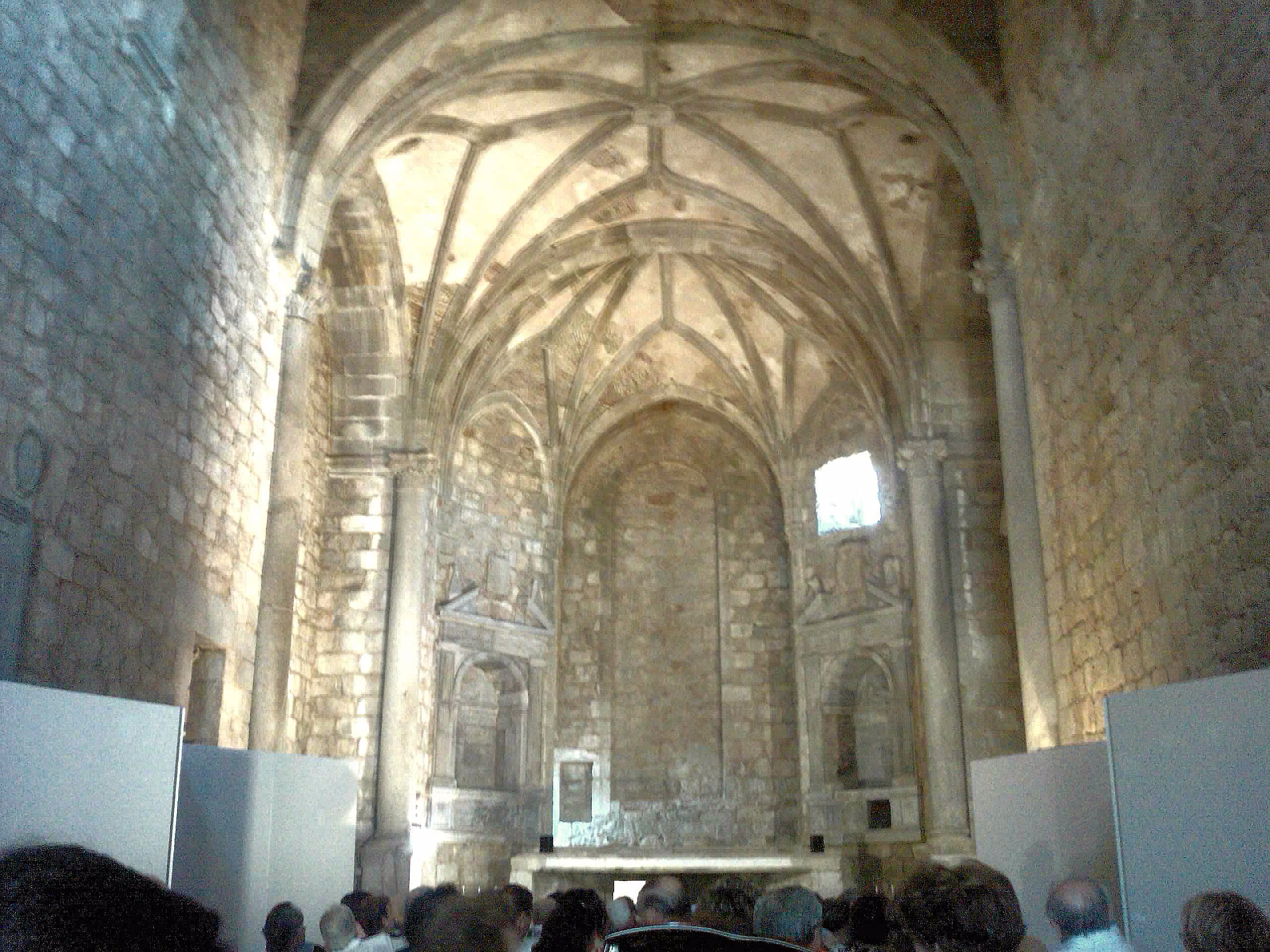 interior